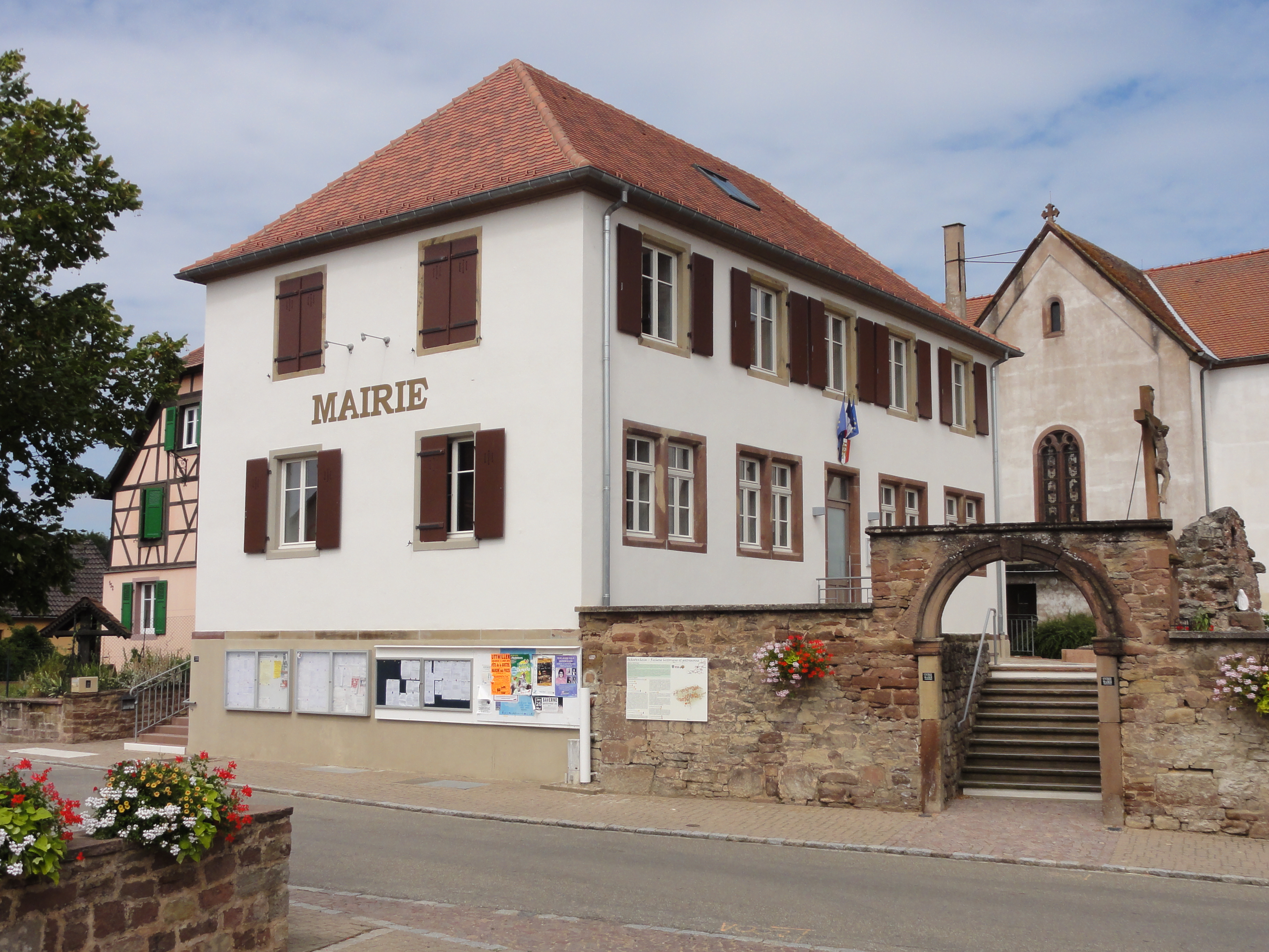 Alsace, Bas-Rhin, Schwenheim, Mairie.